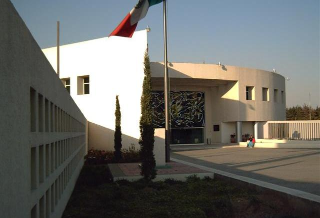 Centro Oncologico Estatal al atardecer, vista con bandera hondeando.